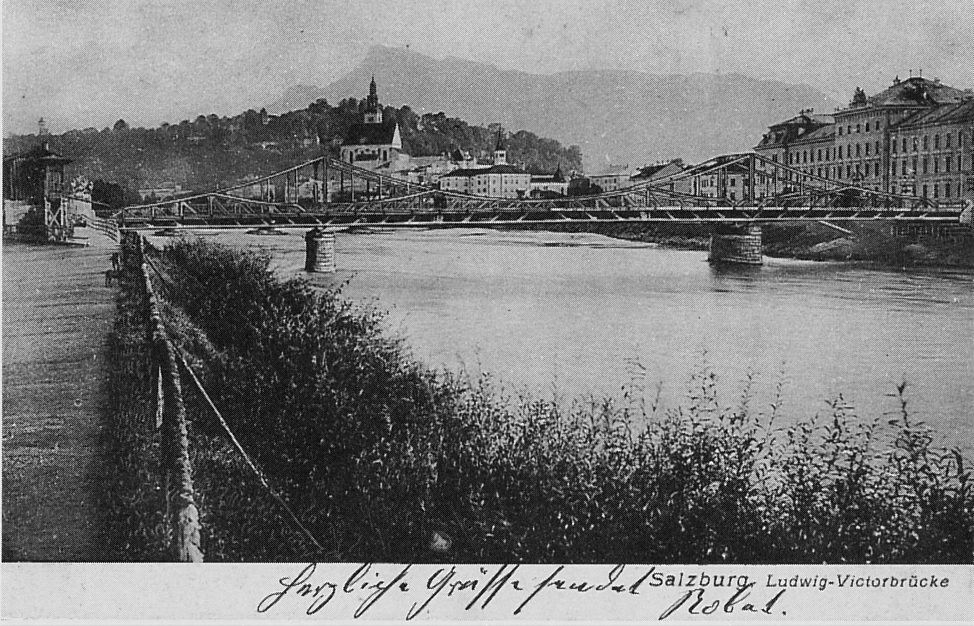 Die 1902 eröffnete Ludwig-Viktor-Brücke, Vorläuferbau der heutigen Lehener Brücke in der Stadt Salzburg; Ansichtskarte